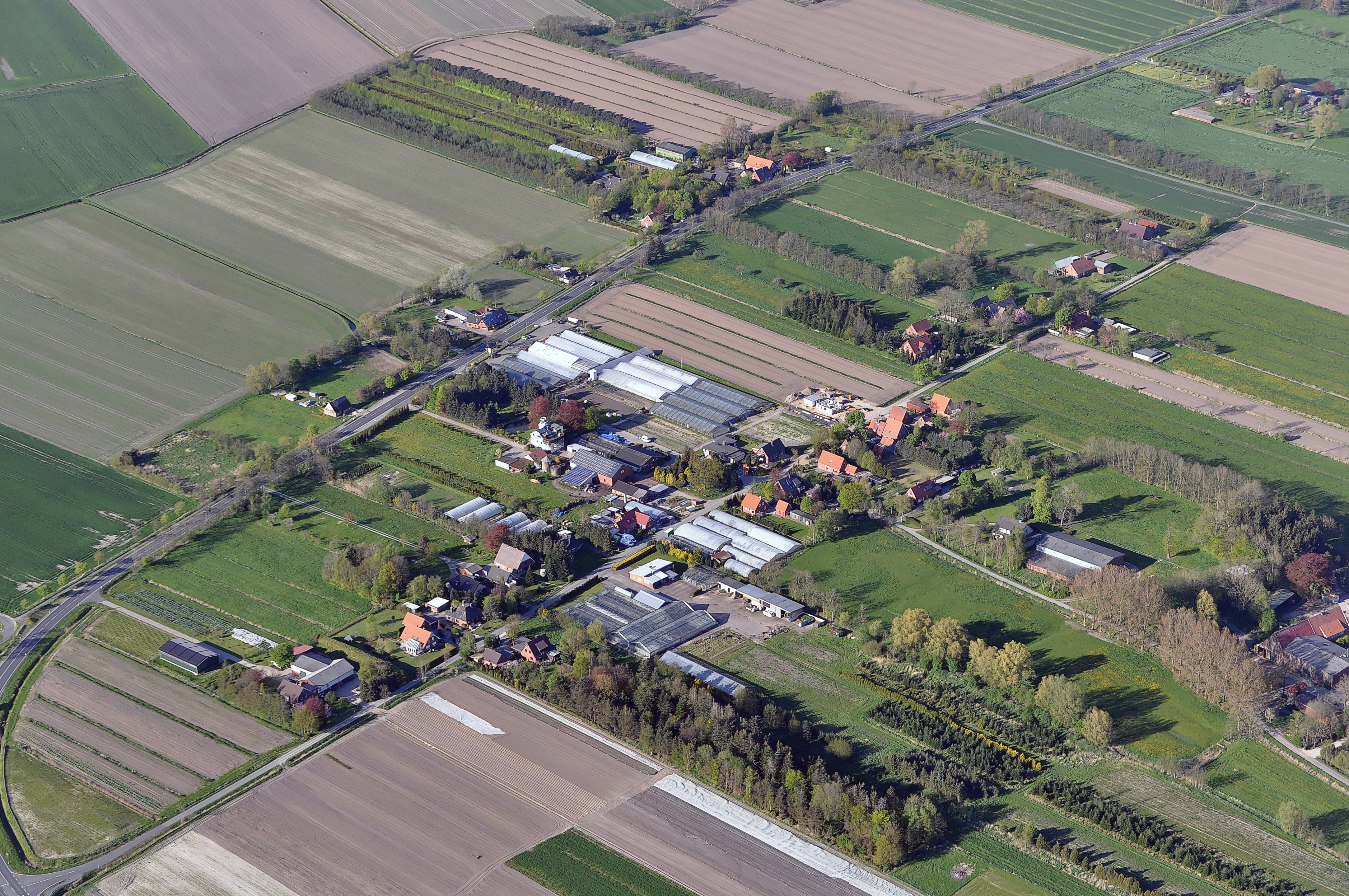 Luftbilder von der Nordseeküste 2012-05